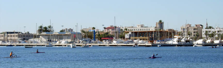 club naútico y casa del mar